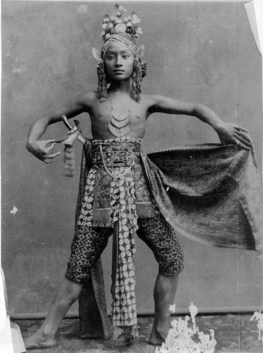 Foto. Een Javaanse danser